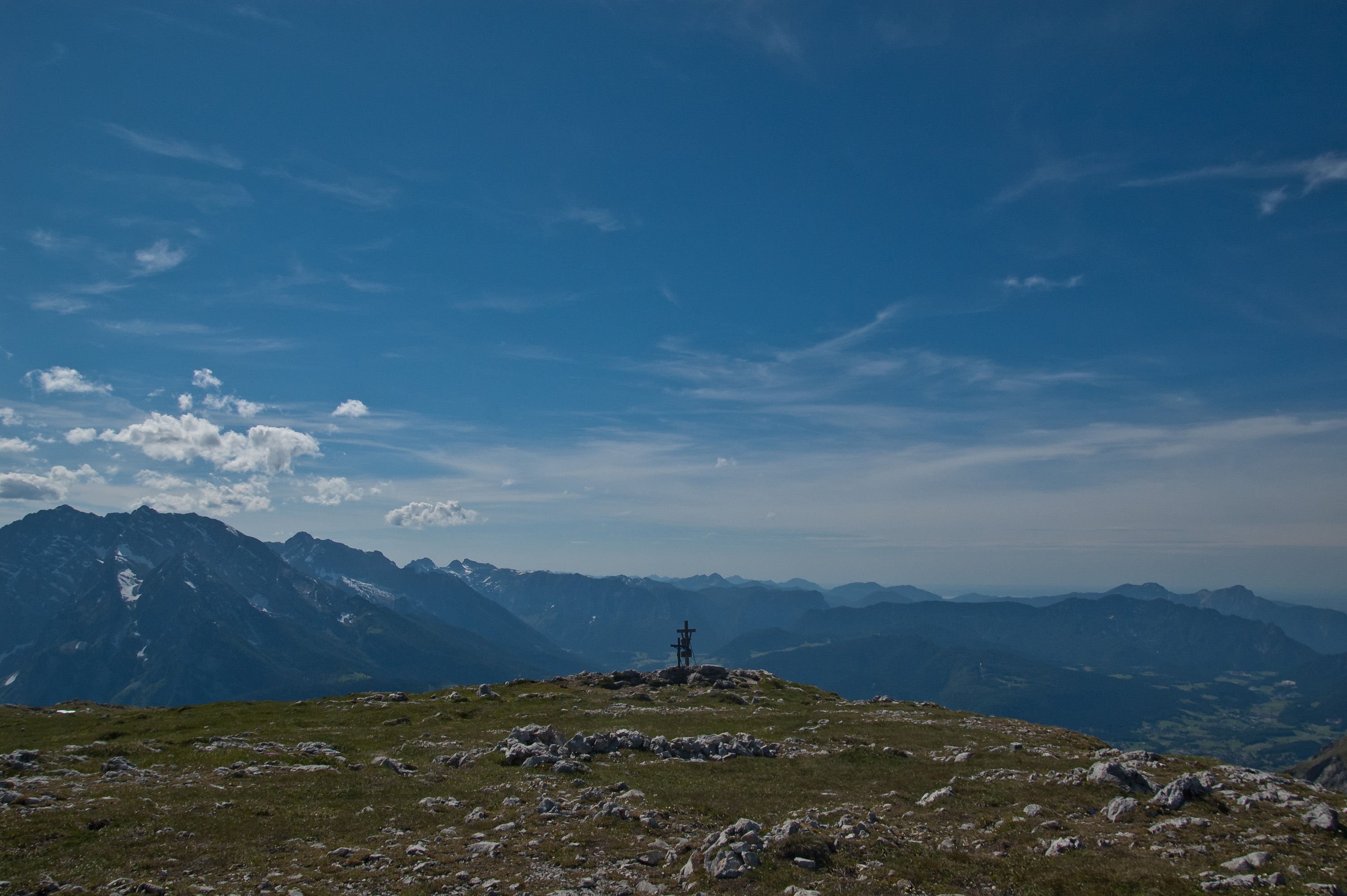 Blick auf die Gipfelkreuze des Schneibsteins mit dem Watzmannmassiv ganz links, dem Hochkalter und der Reiter Alpe im Hintergrund